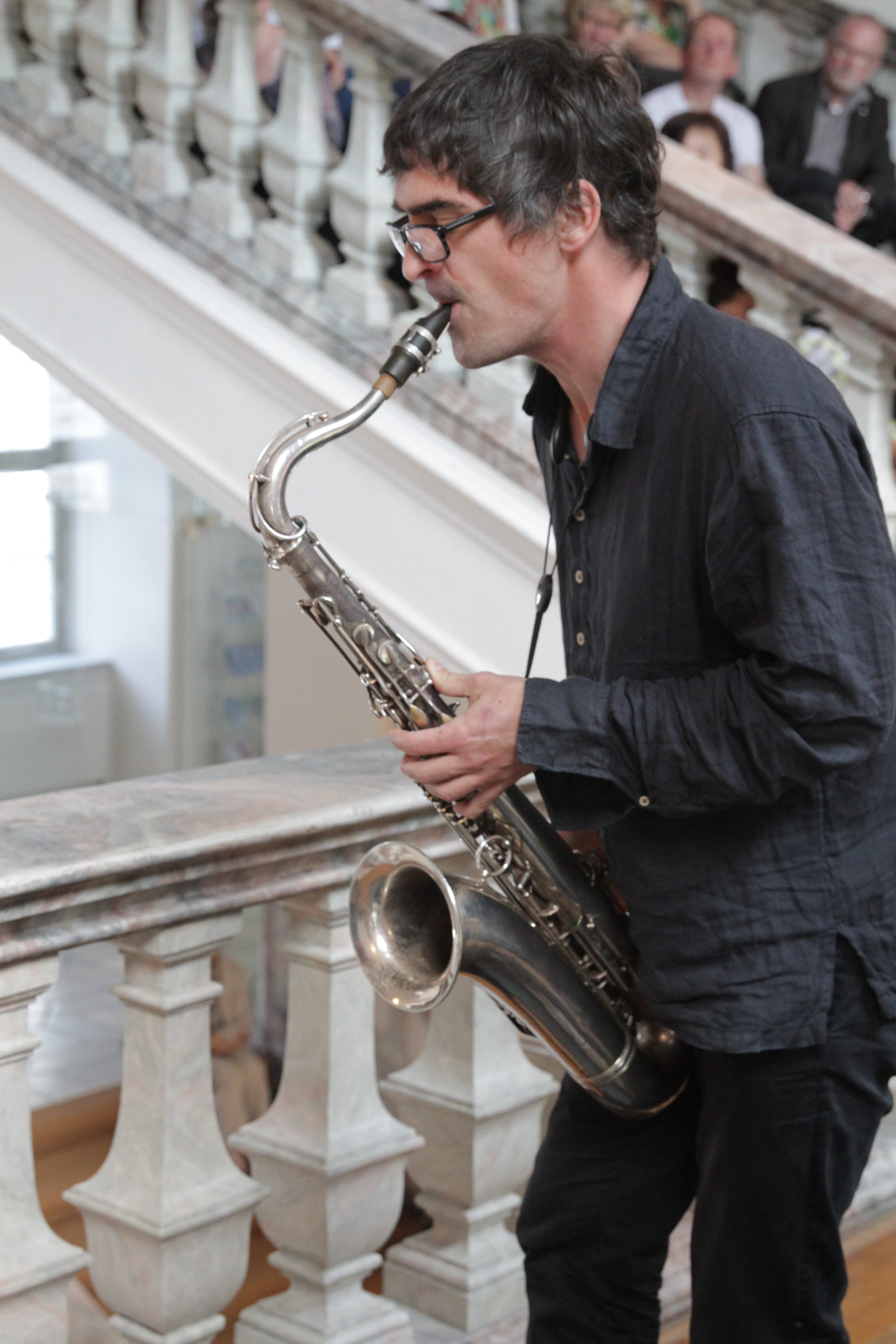 Tonspuren 2014 - Sylvain Rifflet am Saxophon Festivalsommer This photo was created with the support of donations to Wikimedia Deutschland in the context of the CPB project "Festival Summer". This file is made available under the Creative Commons CC0 1.0 Universal Public Domain Dedication. The person who associated a work with this deed has dedicated the work to the public domain by waiving all of their rights to the work worldwide under copyright law, including all related and neighboring rights, to the extent allowed by law. You can copy, modify, distribute and perform the work, even for commercial purposes, all without asking permission. Thomas Springer Personality rights warningAlthough this work is freely licensed or in the public domain, the person(s) shown may have rights that legally restrict certain re-uses unless those depicted consent to such uses. In these cases, a model release or other evidence of consent could protect you from infringement claims.